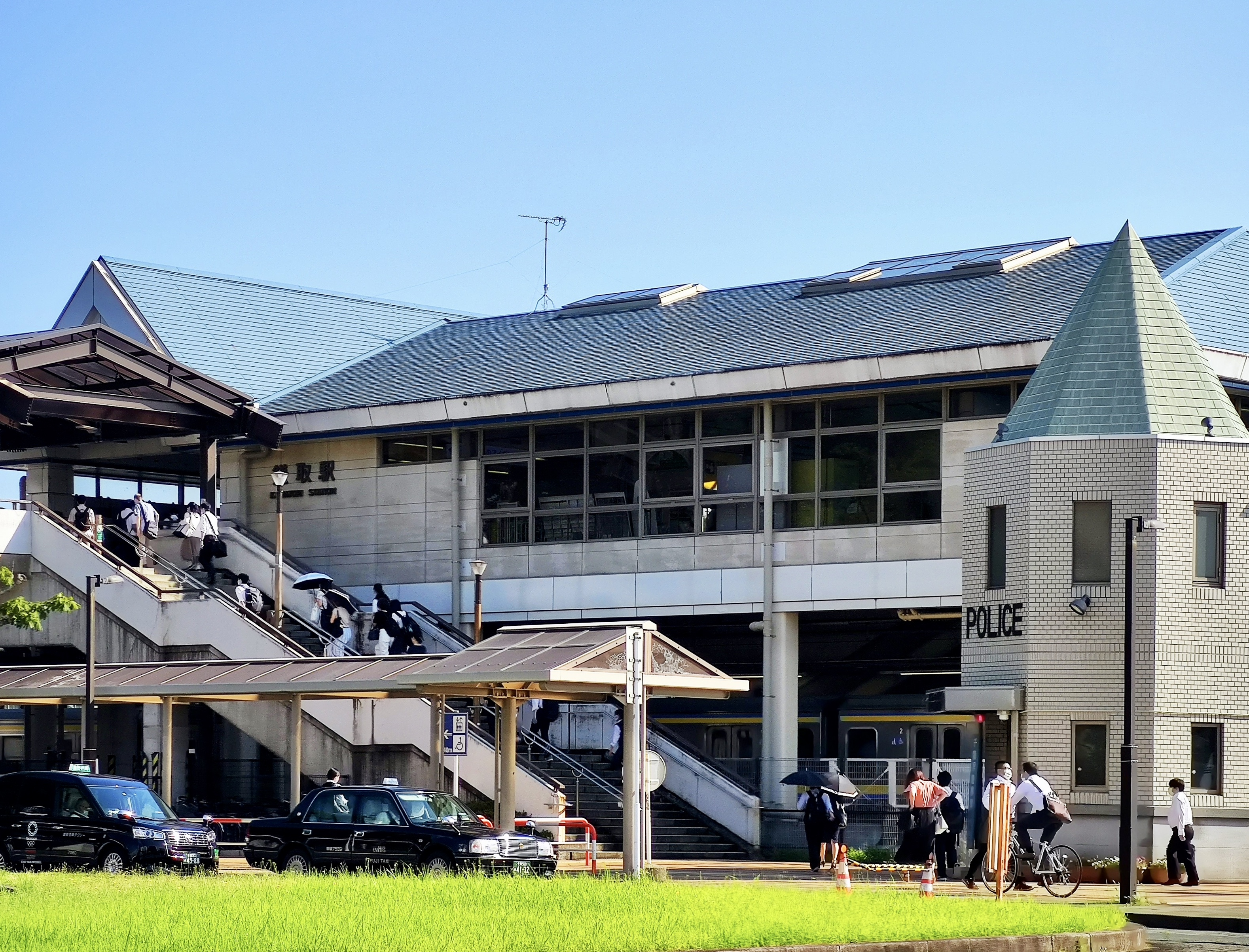 鎌取駅南口